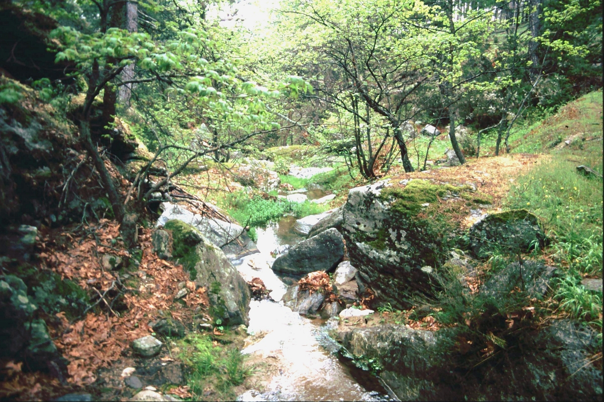 Quellbach oberhalb Maries